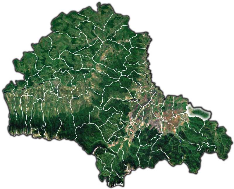 Teliu jud Brasov